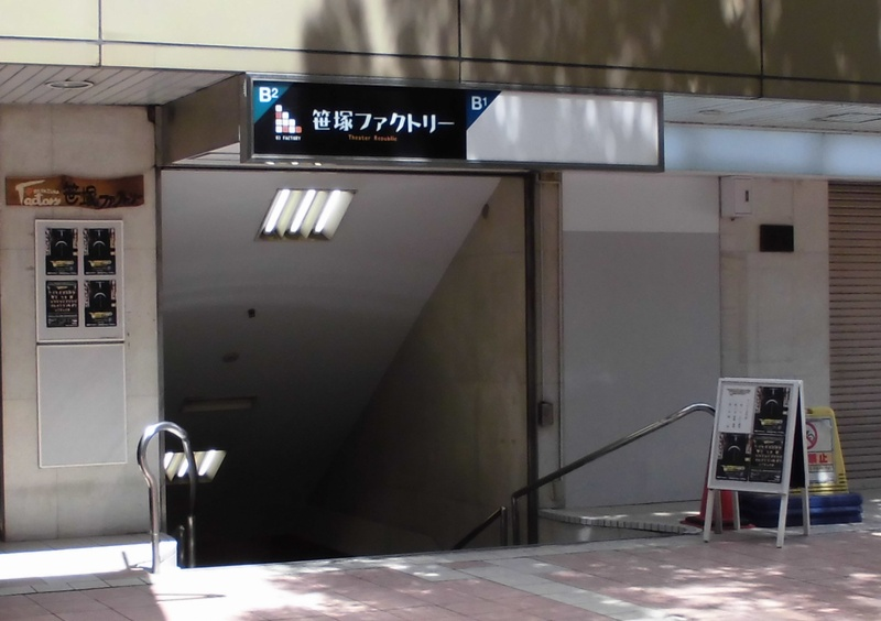 Sasazuka factory (Shibuya, Tokyo, Japan)